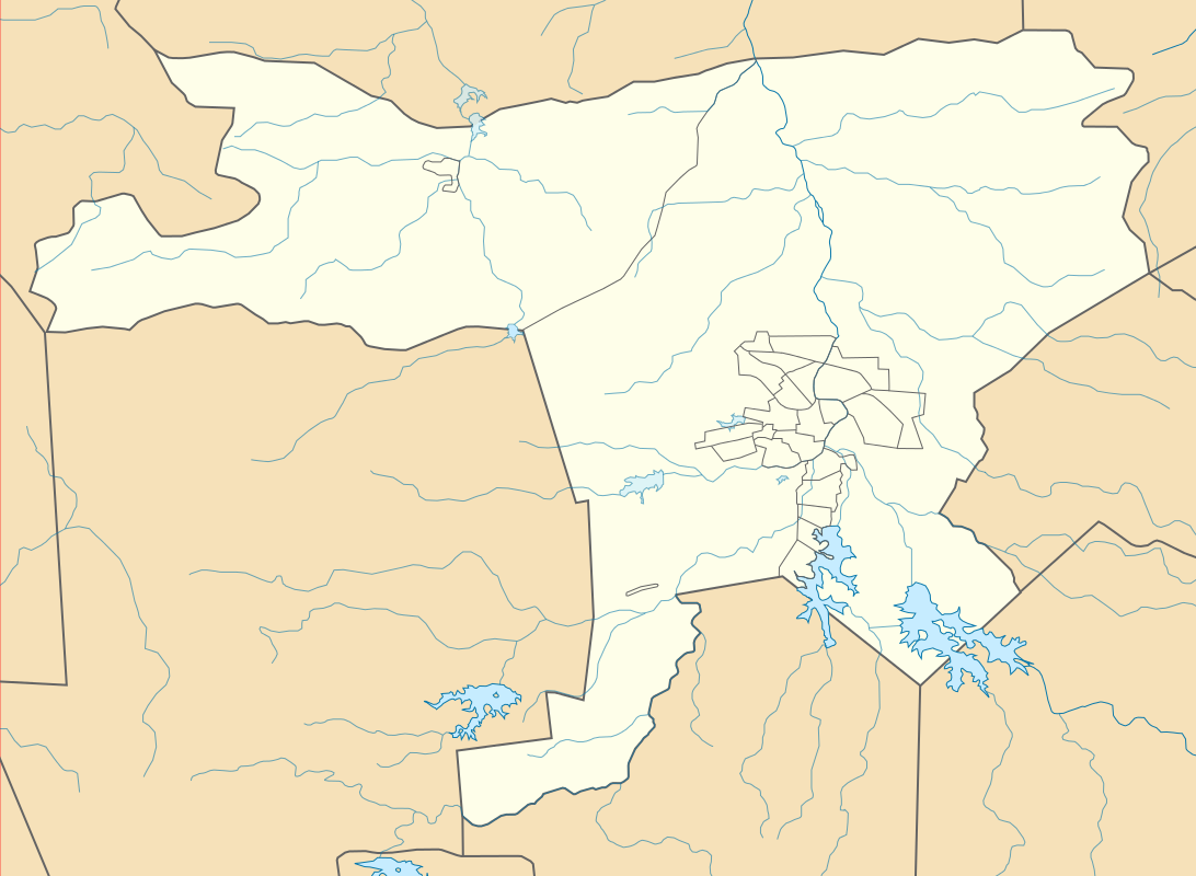 Mapa com a localização e limites de distritos, bairros e zona rural de Patos.